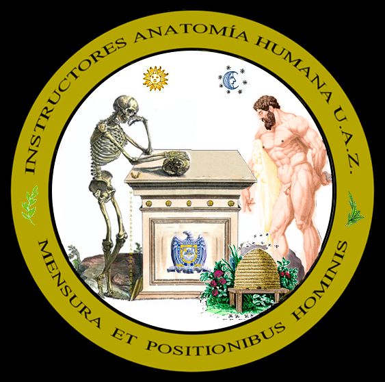 Medidas y posiciones del cuerpo humano